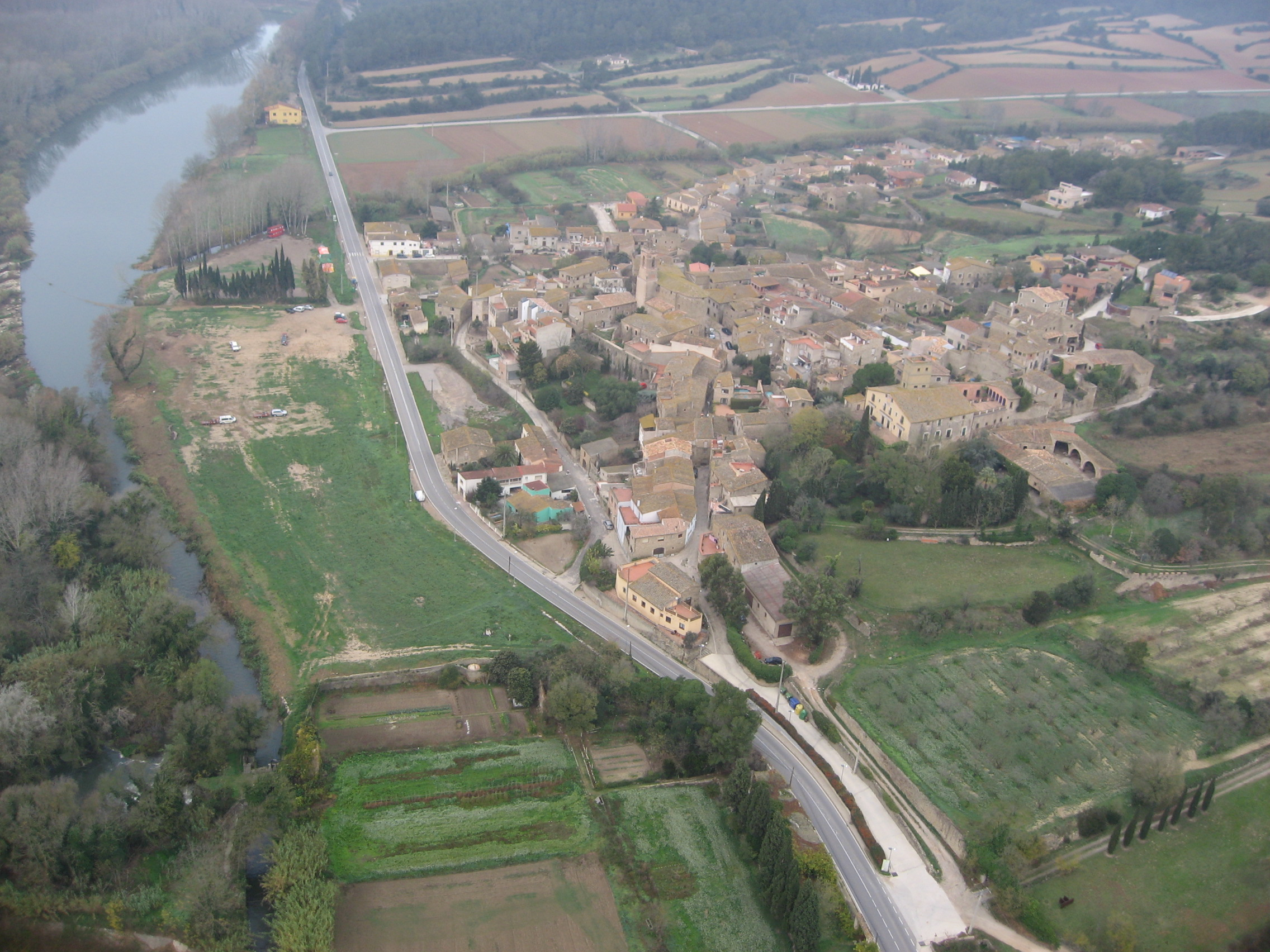 Vol en globus